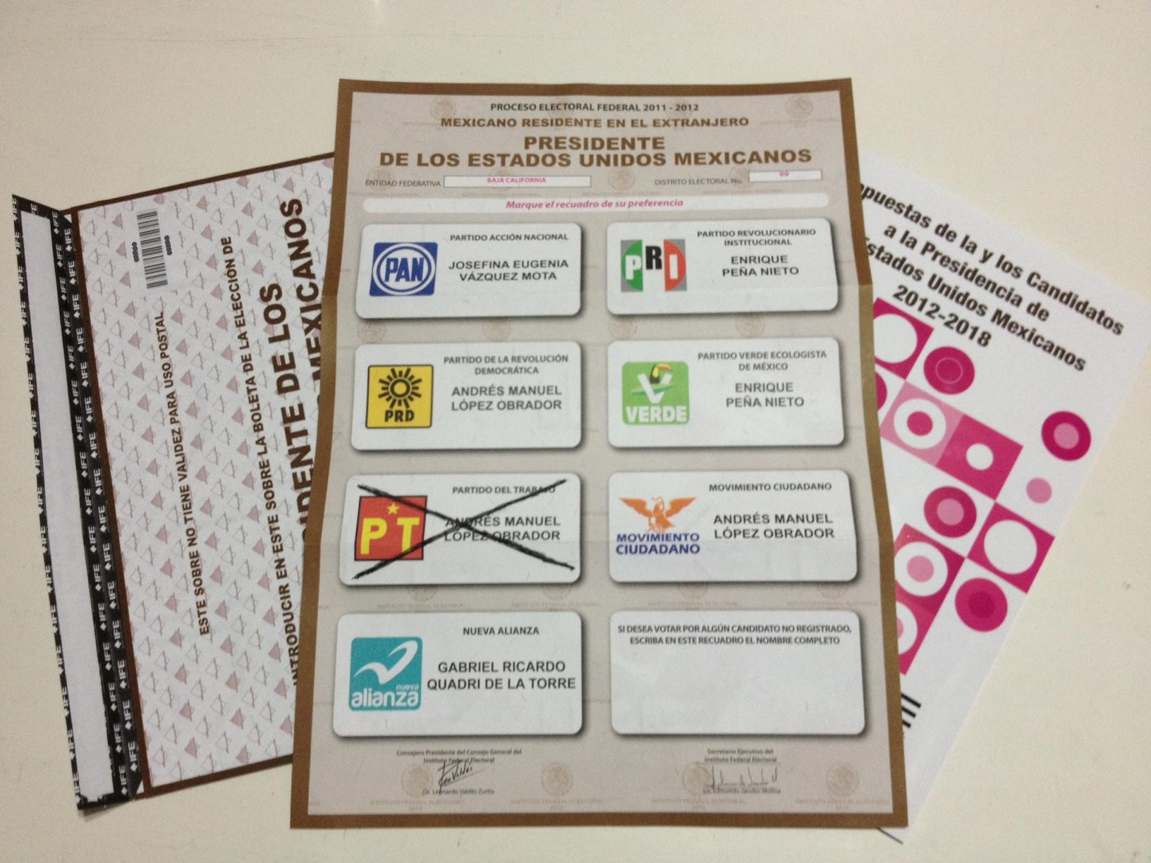 Elementos del paquete electoral postal para voto desde el extranjero de las elecciones federales de México de 2012. Izquierda: sobre para la boleta; centro: boleta electoral marcada; derecha: libreto con las propuestas de cada persona candidata, instrucciones y encuesta